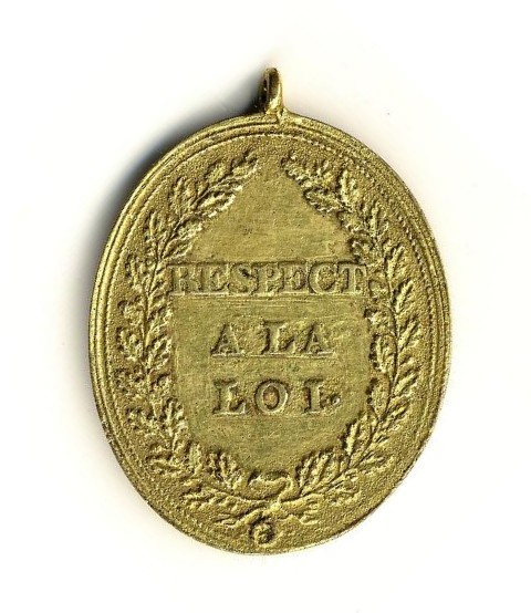 Insigne de Fonction Révolutionnaire